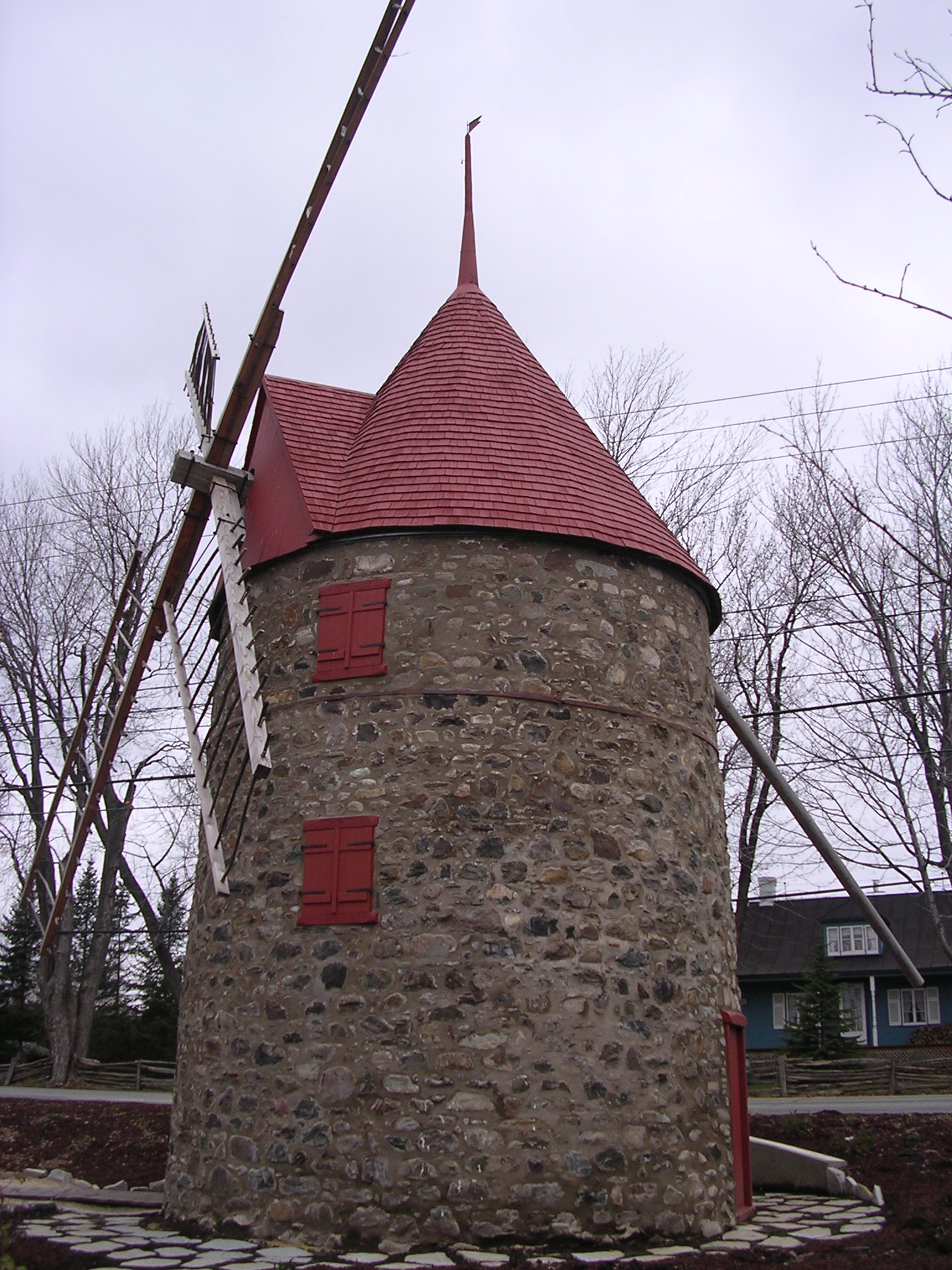 Moulin à vent Grenier, situé à Repentigny (Lanaudière, Québec). Il est connu aussi sous le nom de Moulin Lebeau. Moulin à farine; moulin Grenier; moulin Lebeau.